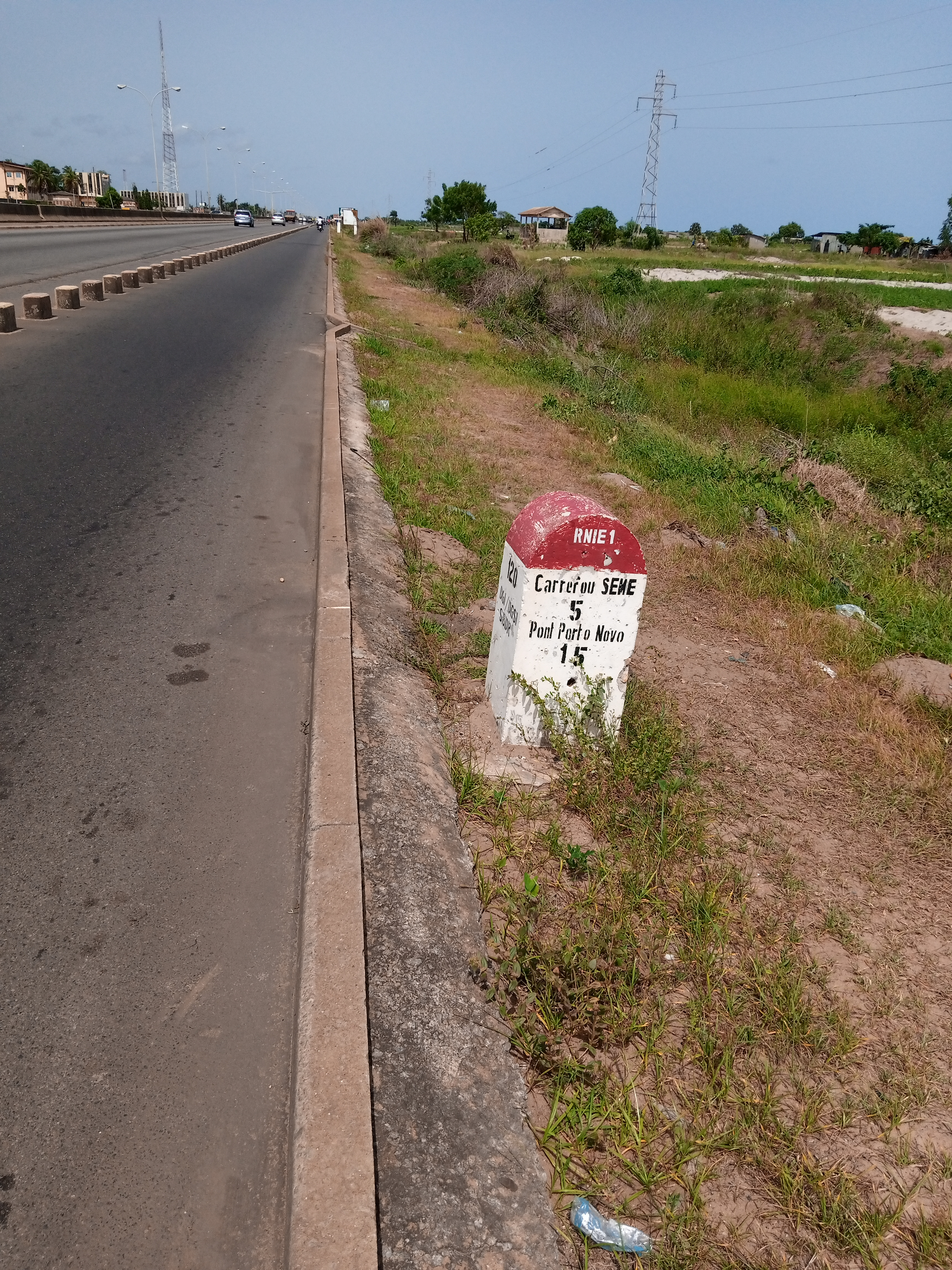 borne kilométrique à Sèmè Podji This is an image with the theme "Africa on the Move or Transport" from: Benin